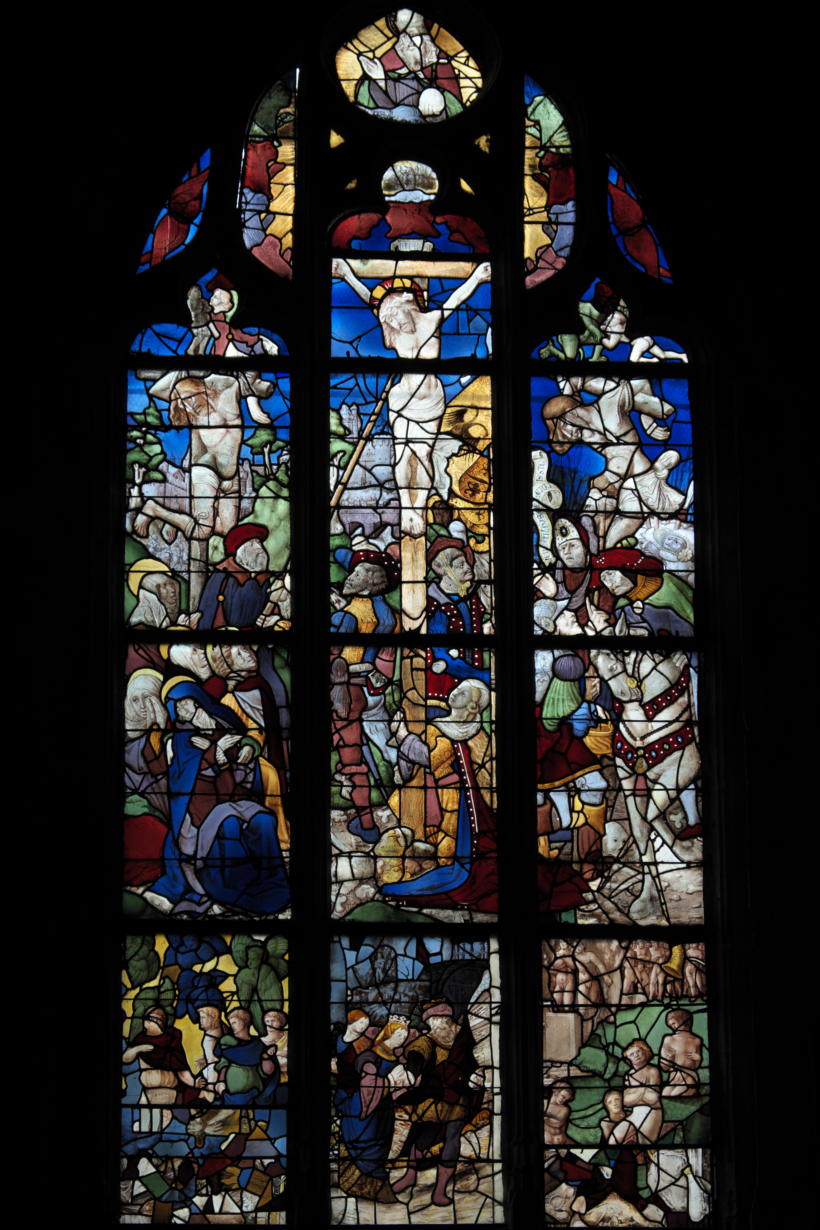 Katholische Kirche Saint-Pierre in Dreux im Département Eure-et-Loir (Centre-Val de Loire/Frankreich), Bleiglasfenster aus dem 16. Jahrhundert in der Martinskapelle; Darstellung: Christus am Kreuz